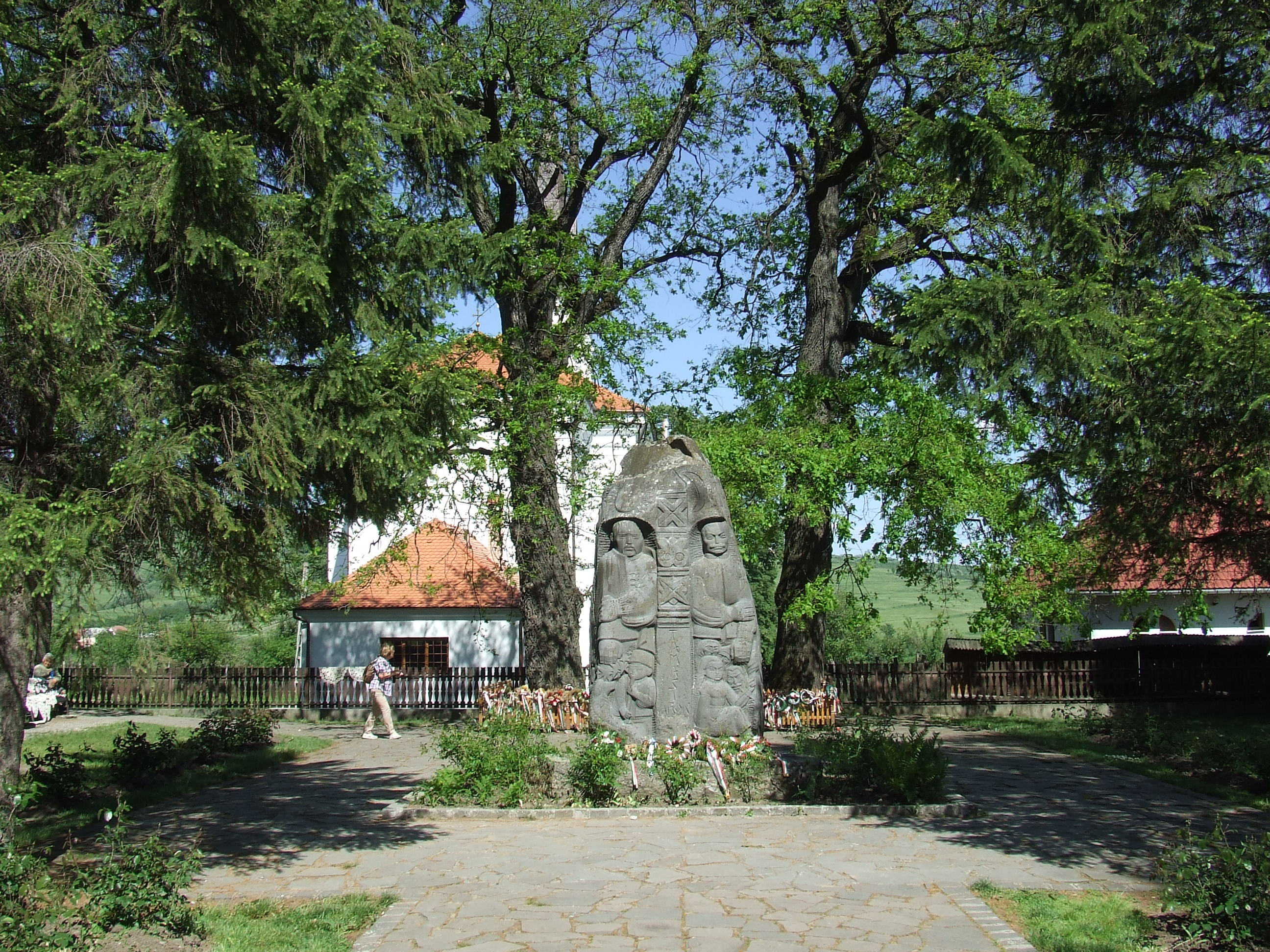 Farkaslaka, Tamási Áron sírja